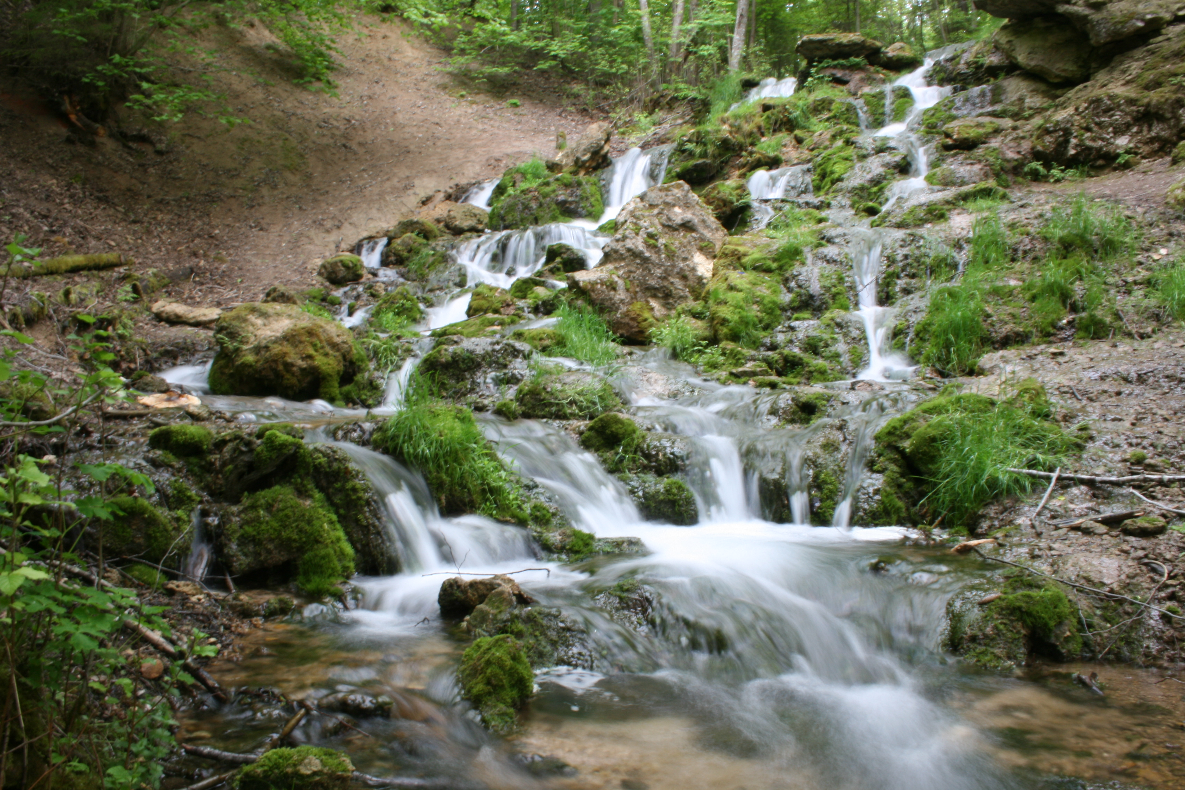 Septiņavotu Lielais ūdenskritums .Seven sources great falls